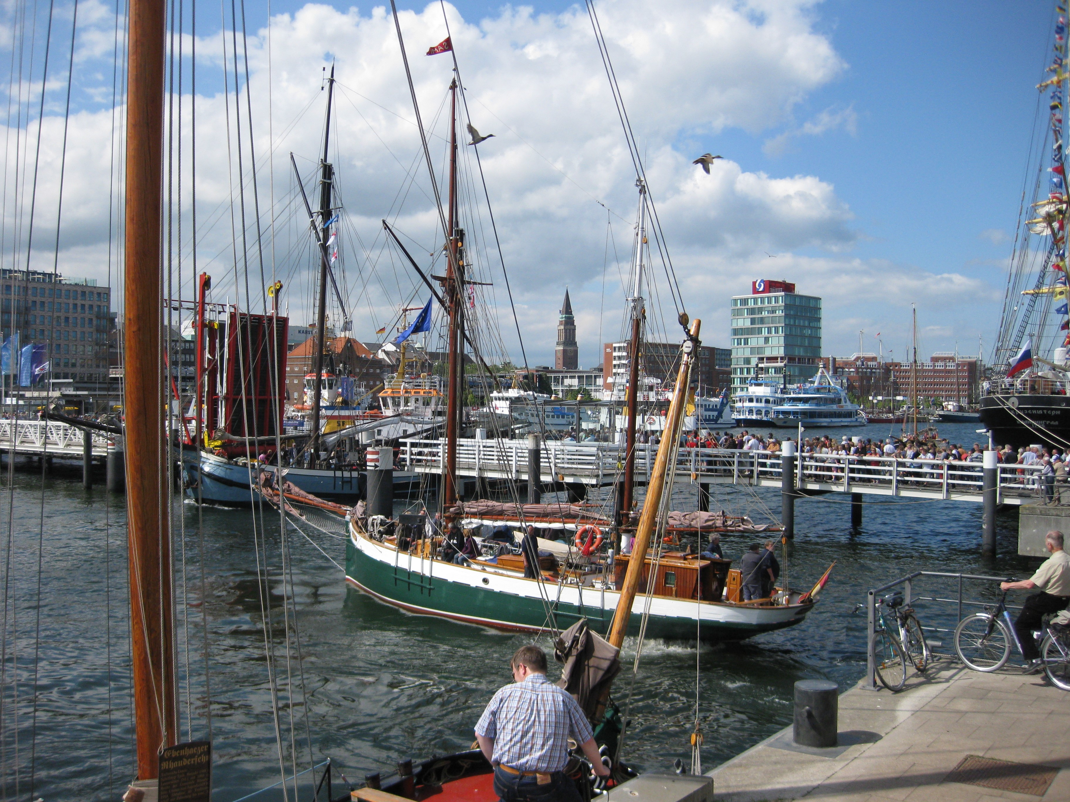 Hörnbrücke geöffnet Kieler Woche 2013